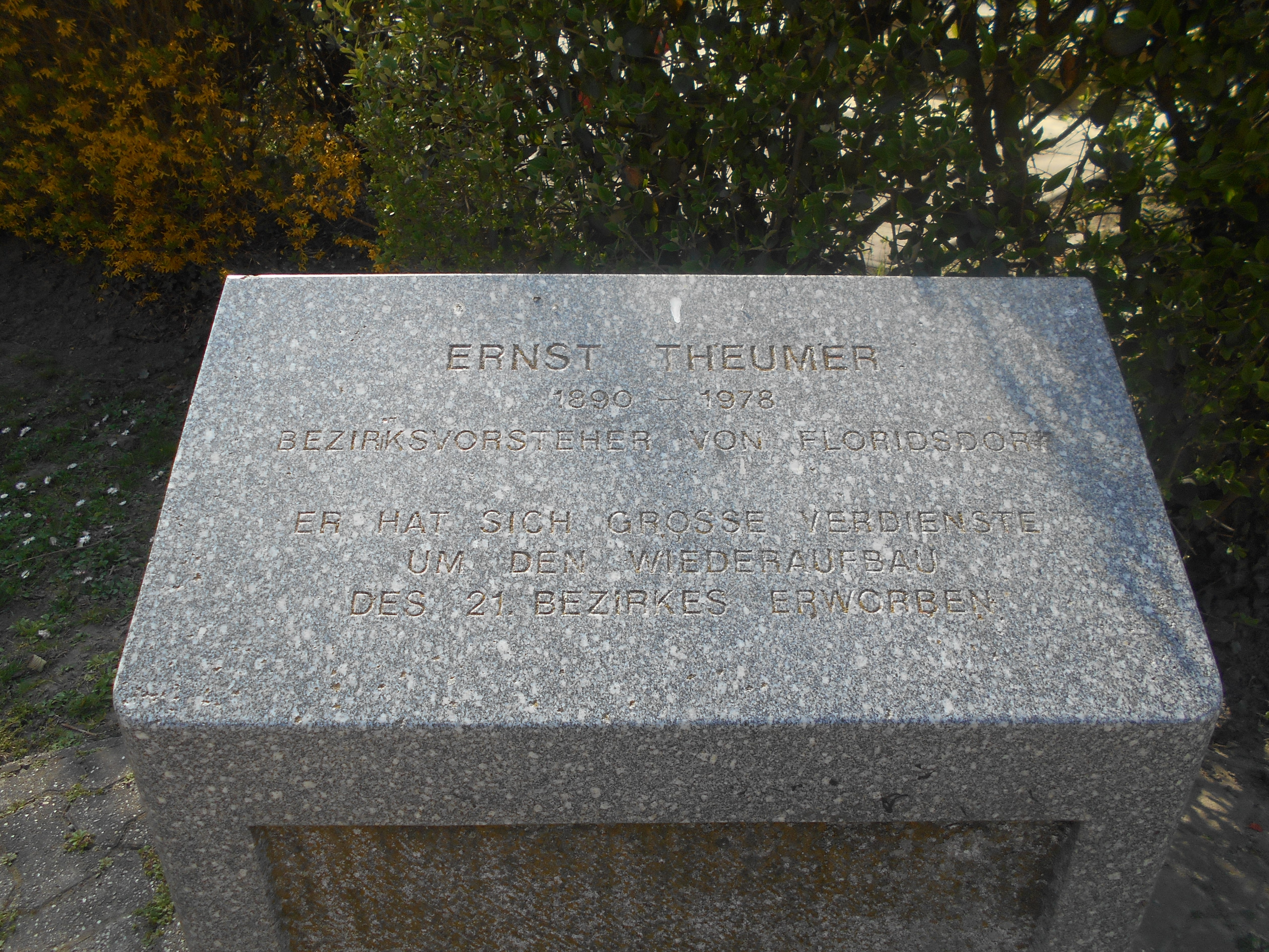 Ernst-Theumer-Hof, Gedenktafel für Ernst Theumer